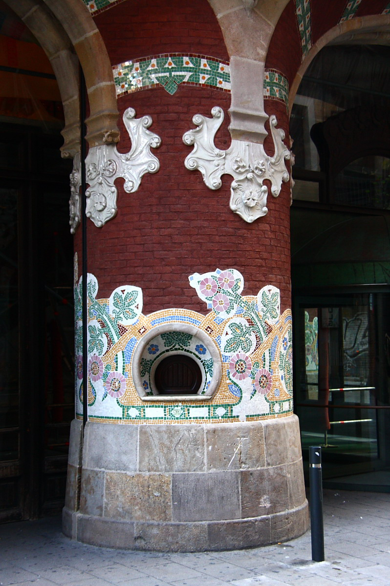 Taquilla original amb trencadís de Lluís Bru. Palau de la Música Catalana de Domènech i Montaner